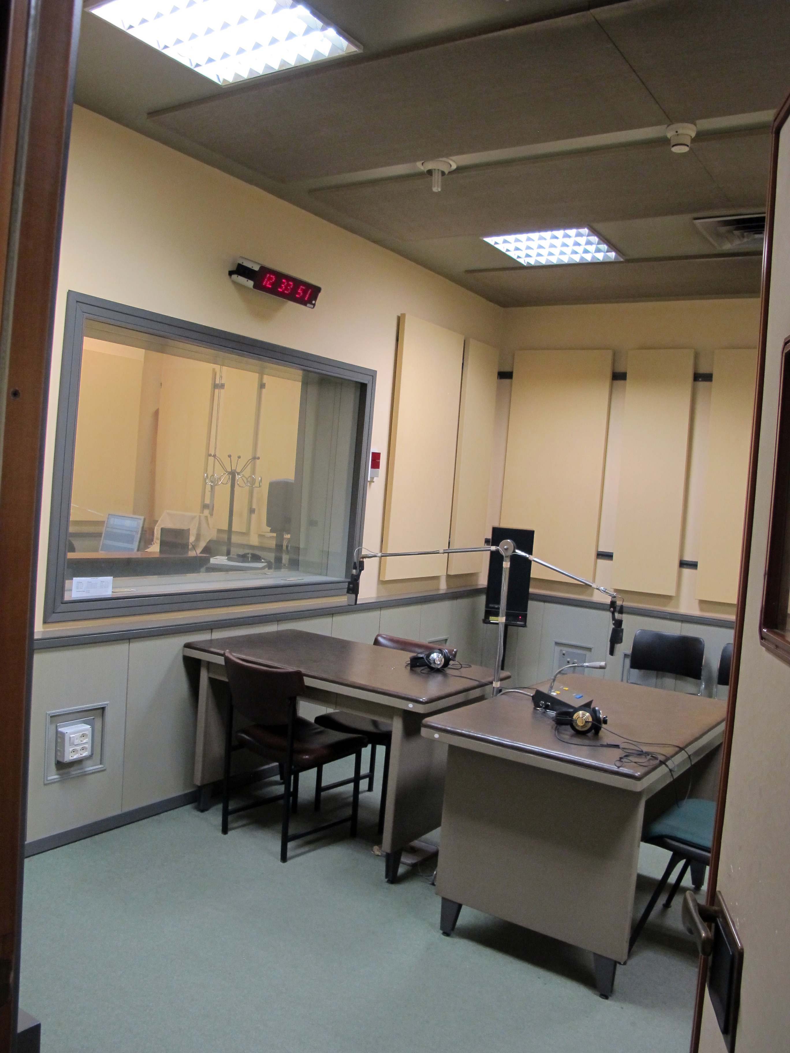 RAI (Firenze)